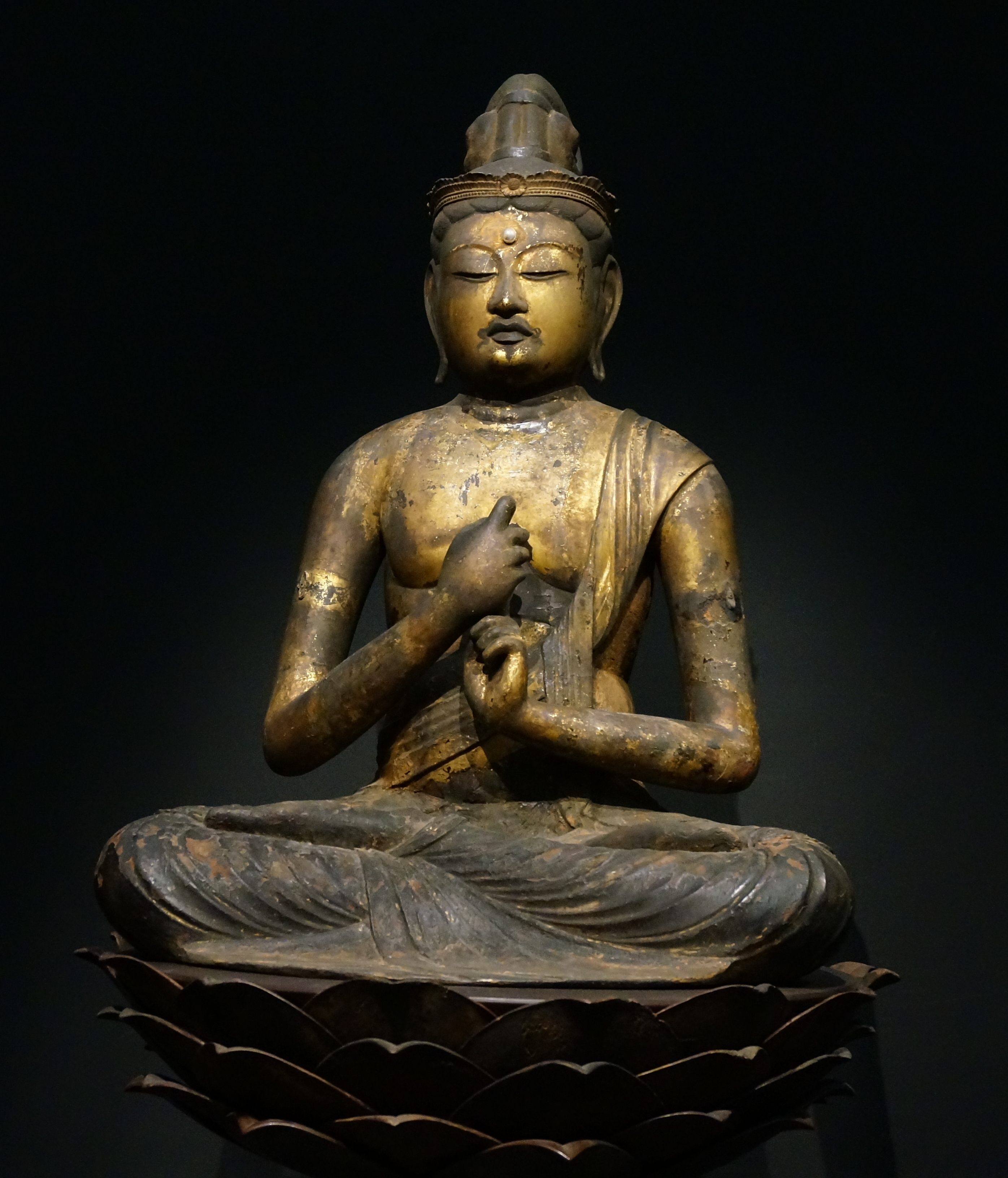 大日如来、11世紀から12世紀、東京国立博物館にて。重要文化財。